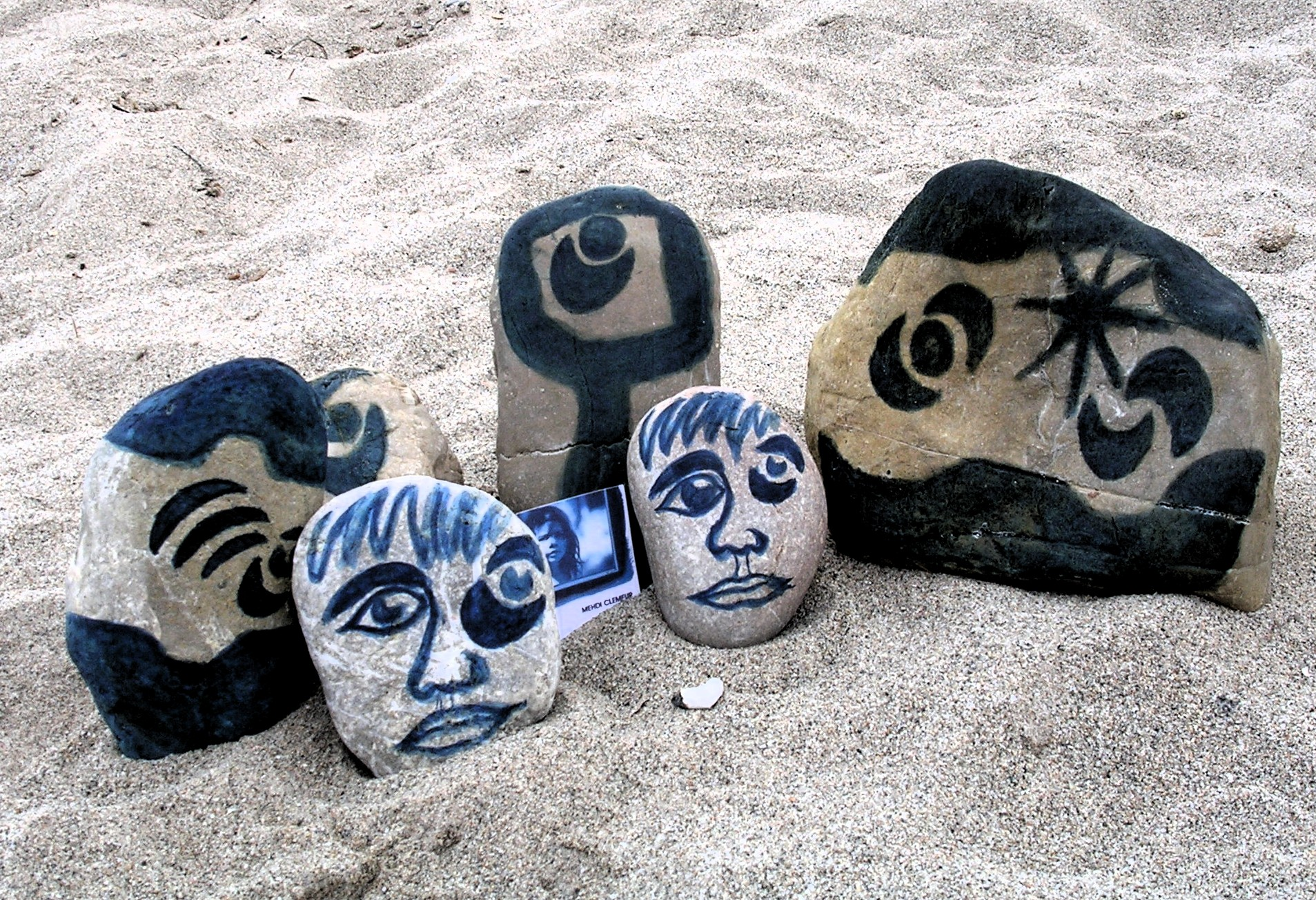 Land Art- Pierres photographiques (Oro-cyanotype,) 2005, Mehdi Clemeur